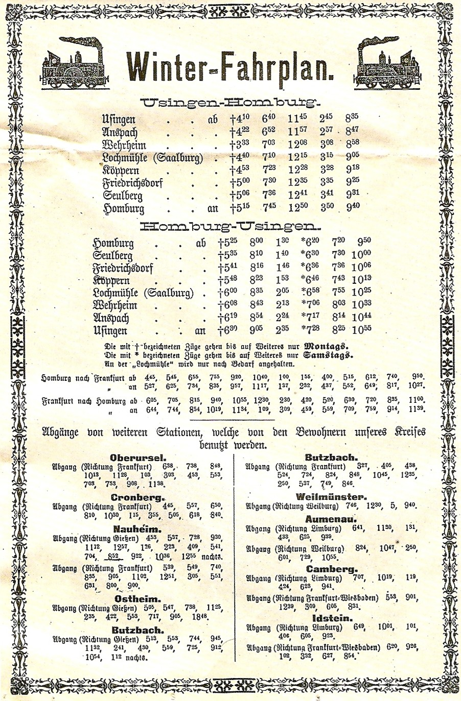 Erster Fahrplan der Eisenbahn Usingen-Homburg (heute: Taunusbahn) aus dem Eröffnungsjahr 1895